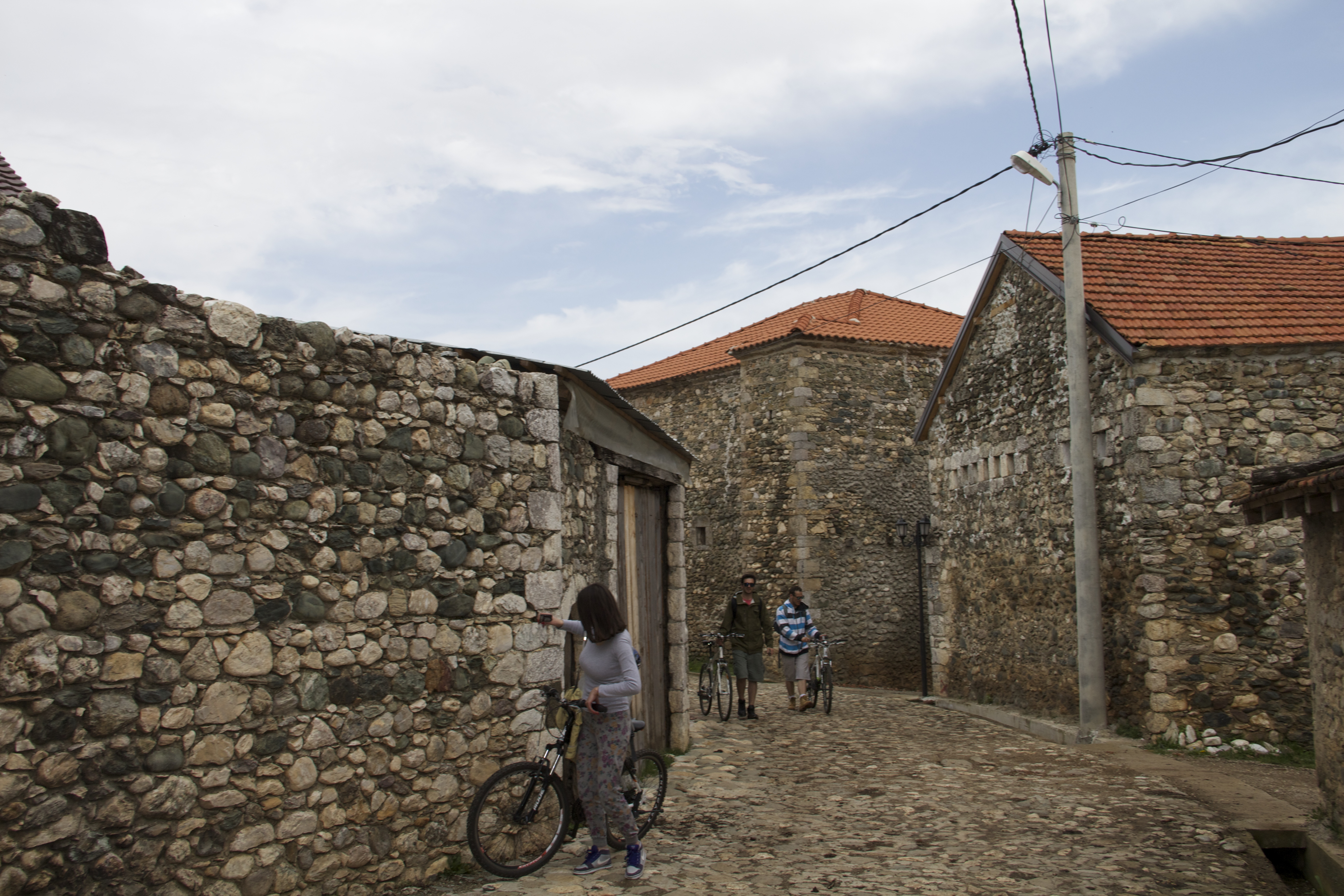 Kompleksi i Kullave në lagjën Mazrrekaj